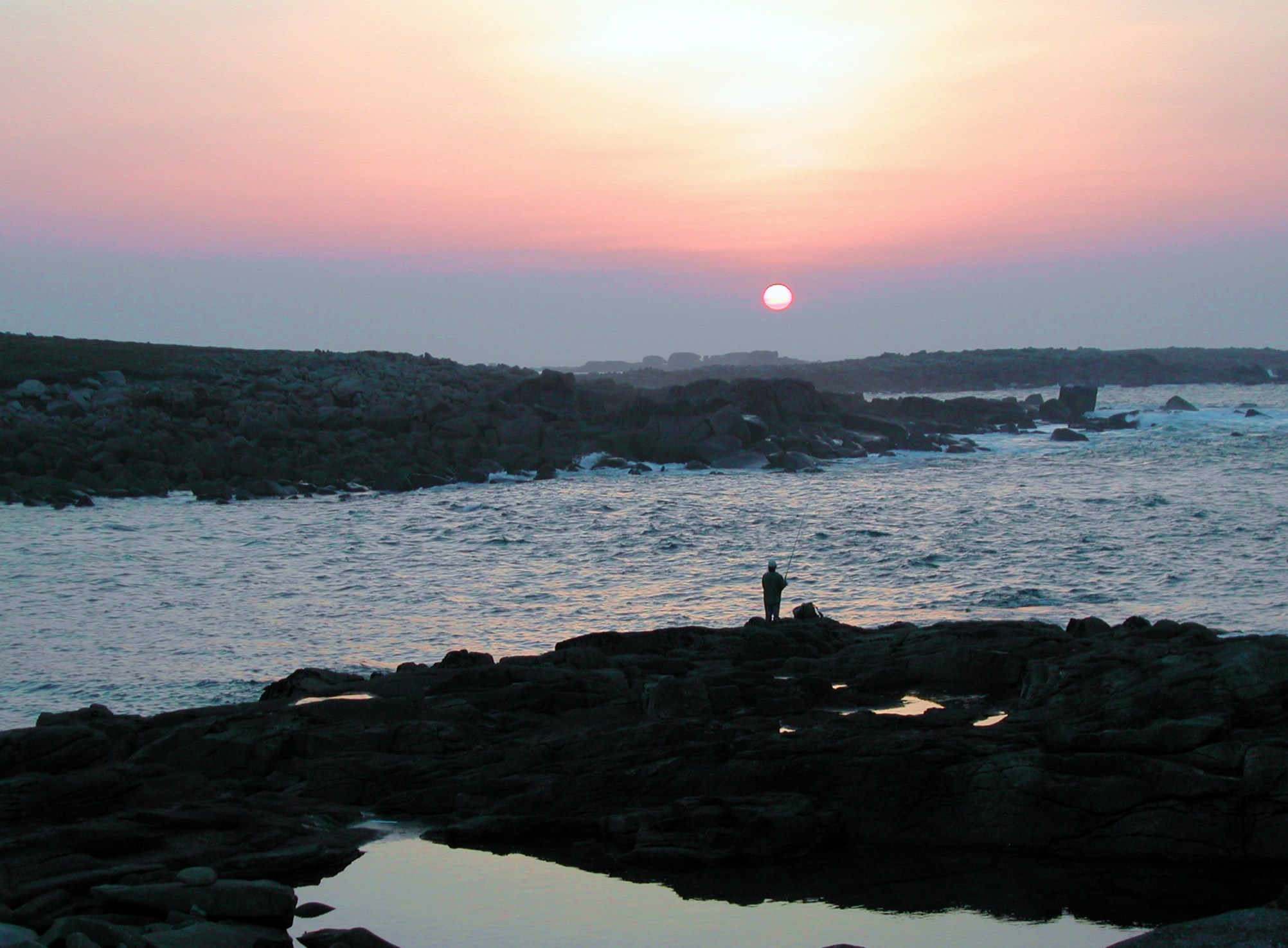 Île-Grande quartier de Pleumeur-Bodou dans les Côtes-d'Armor Bretagne